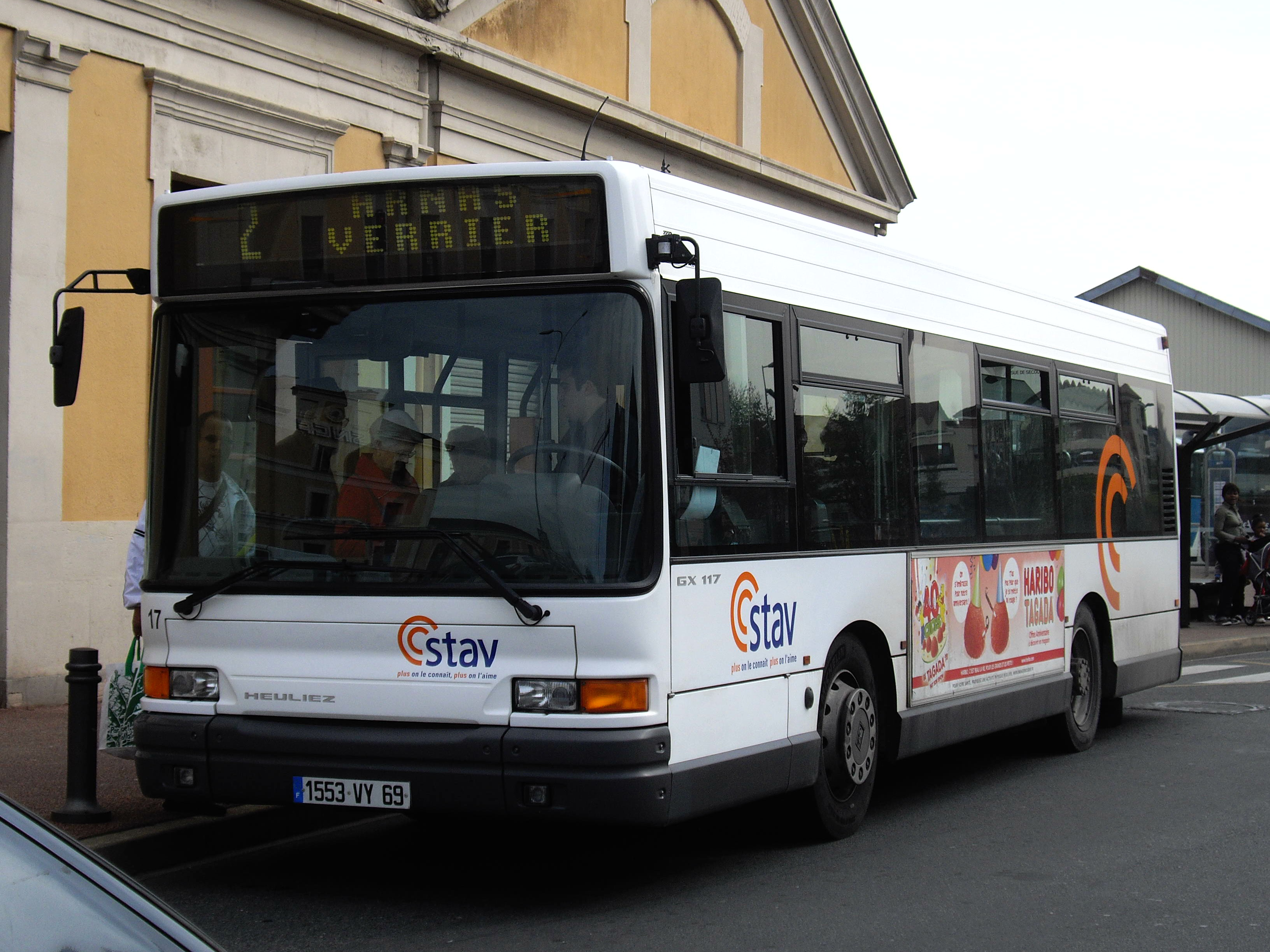 Un Heuliez GX117 à Villefranche-Sur-Saône sur la ligne 2 du réseau STAV devenu Libellule, à la Gare.